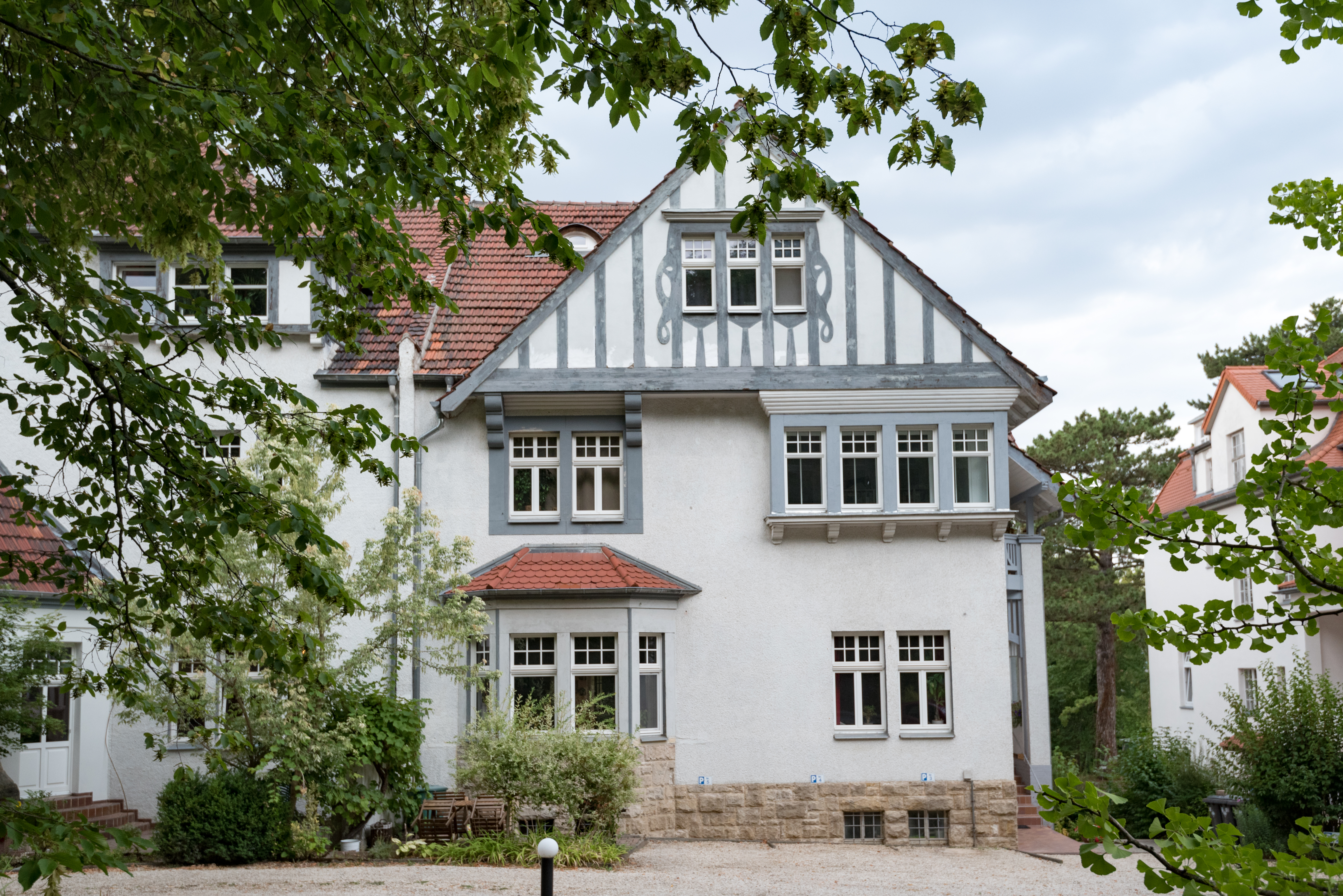 Naumburg (Saale), Hochstraße 4